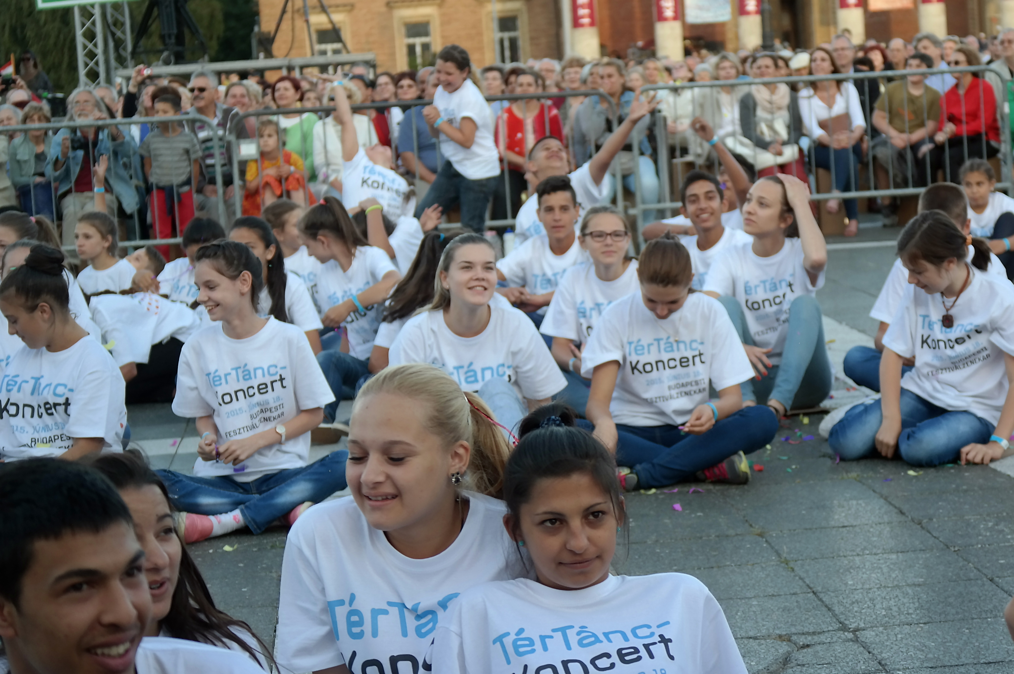 TérTáncKoncert gyermekszereplői (Budapest, VII. kerület, Hősök tere)